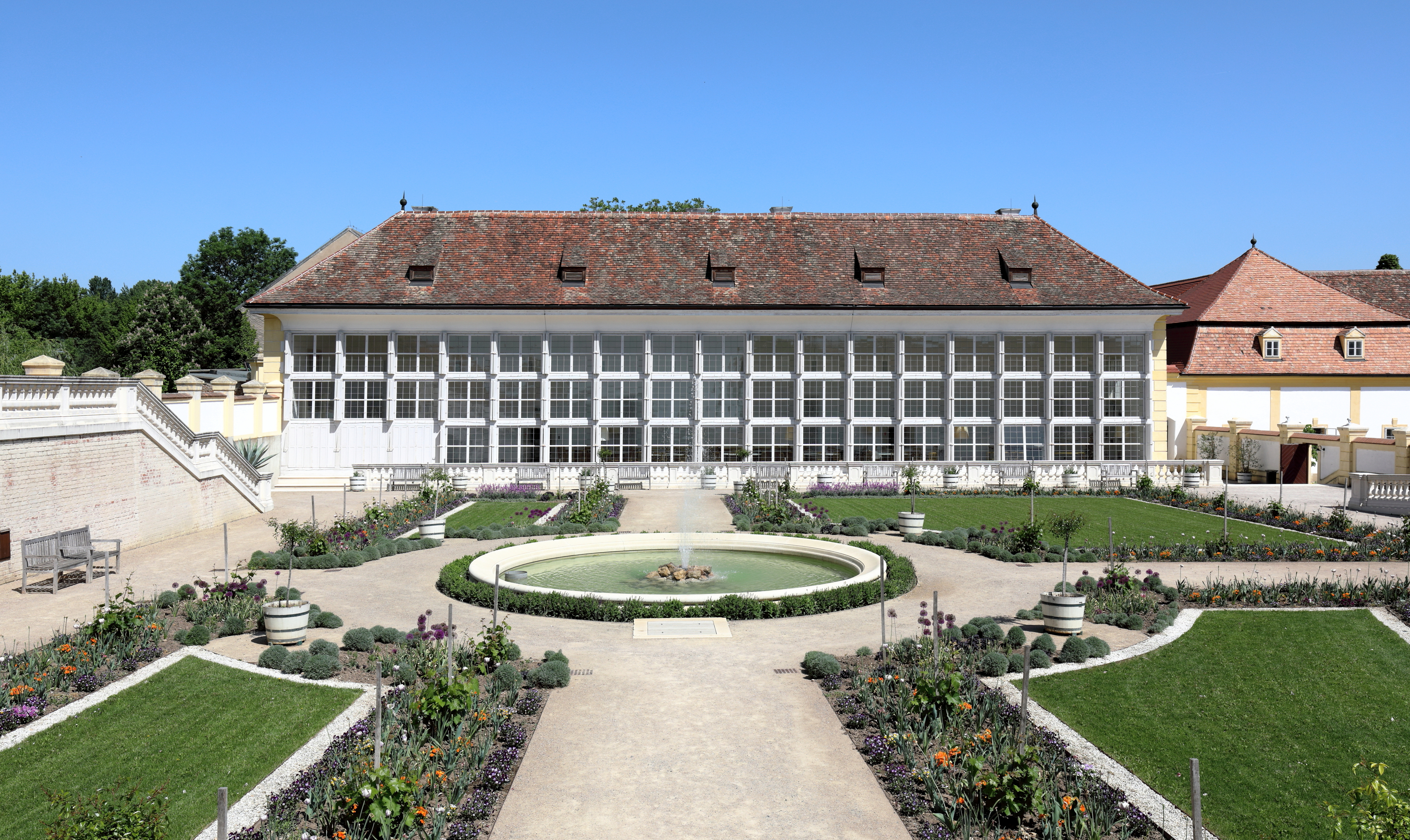 Die westseitige Orangerie der Schlossanlage Schloss Hof in der niederösterreichischen Marktgemeinde Engelhartstetten.Die Schlossanlage wurde um 1627 auf einer Geländekante und östlich der mittelalterlichen Feste Hof errichtet. Nachdem 1725 Prinz Eugen die Anlage erworben hatte, baute er diese zu einem repräsentativen Landsitz aus. 1755 kam das Schloss in den Besitz von Maria Theresia. Von 1773 bis 1775 erfolgte dann ein Um- und Ausbau zum heutigen Erscheinungsbild durch Franz Anton Hillebrandt.